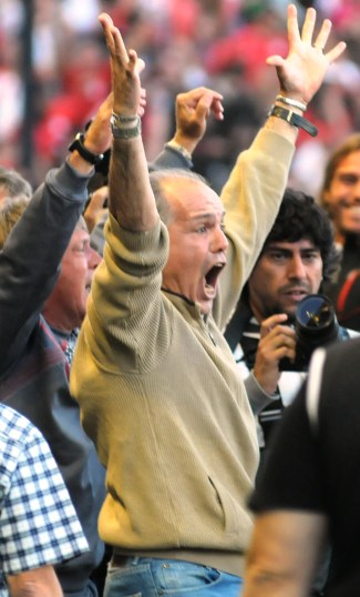 Alejandro Sabella, celebrando la obtención del Torneo Apertura 2010, su segundo título oficial como entrenador de Estudiantes de La Plata tras consagrarse campeón de la Copa Libertadores 2009.